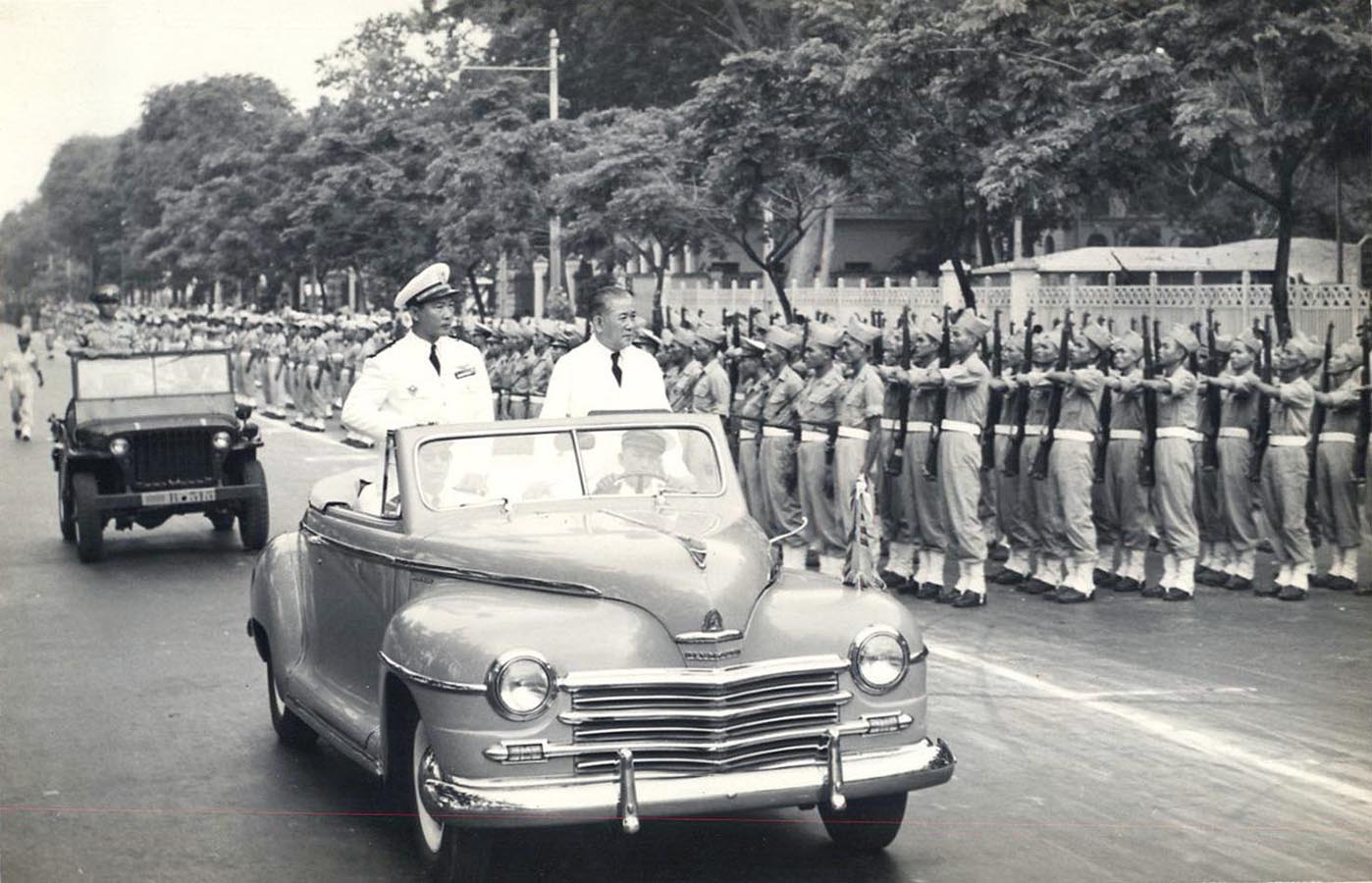 1951 Indochine - Saigon - Défilé des dirigeants indochinois